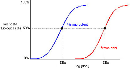 Agonist Dose-Response Curve (Catalan)